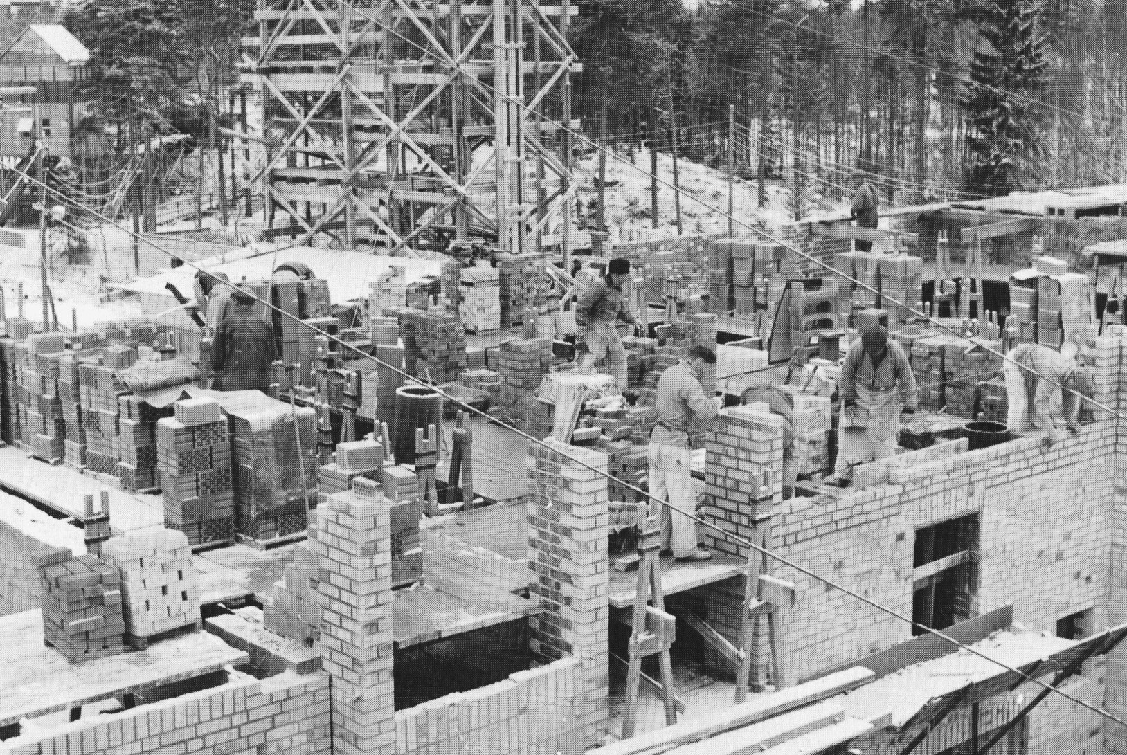 Byggarbetsplats i Stockholm med traditionell tegelmurning